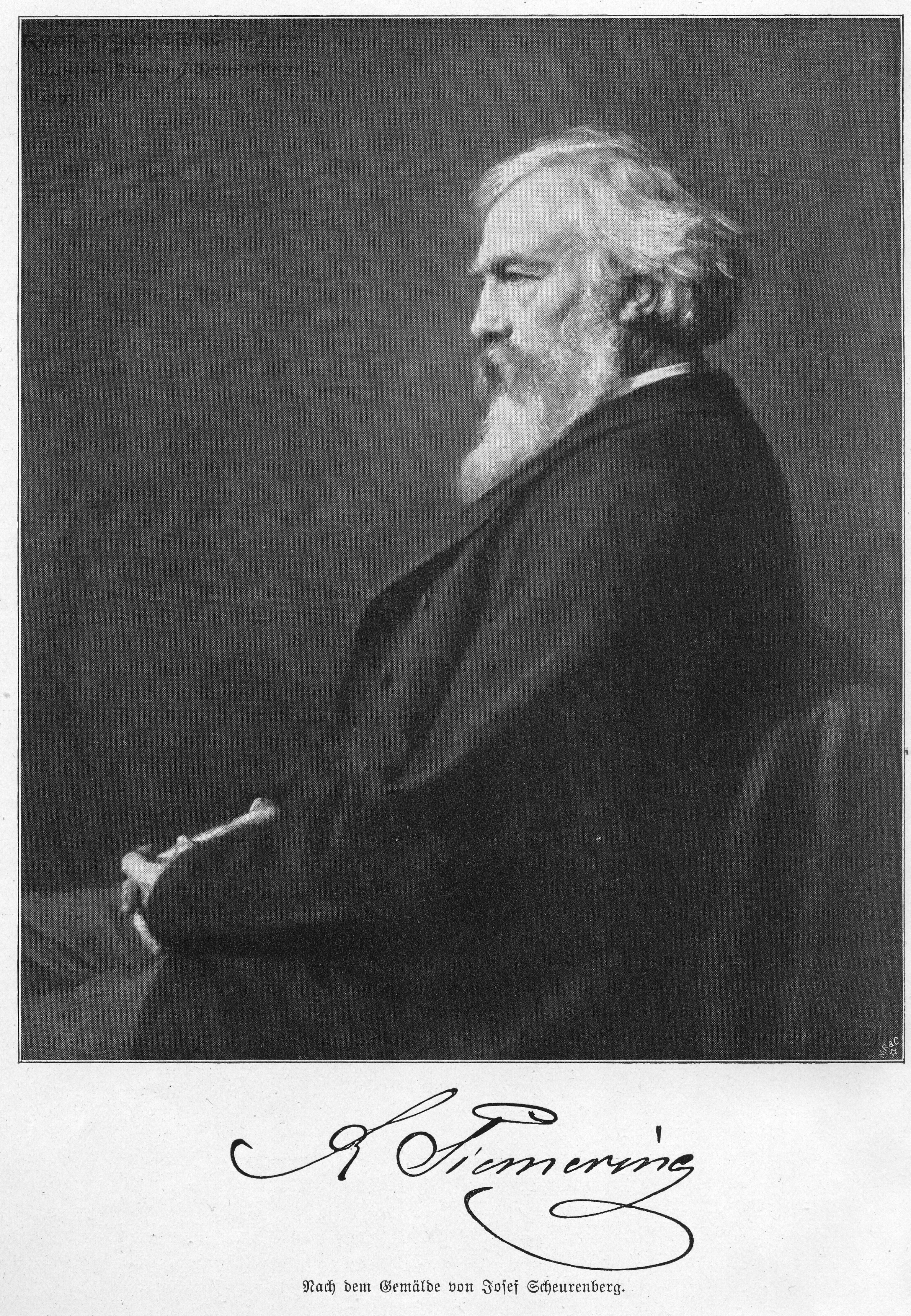 Portrait des Bildhauers Rudolf Siemering (1835-1905)